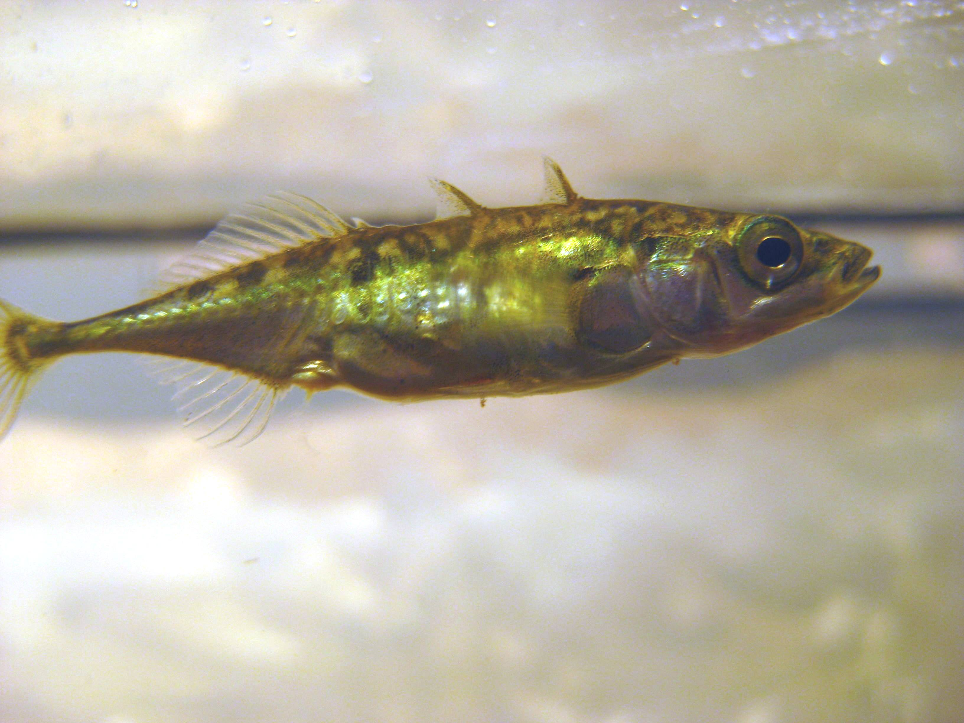 Трёхиглая колюшка (Gasterosteus aculeatus), Fluvarium, St. John's, NL